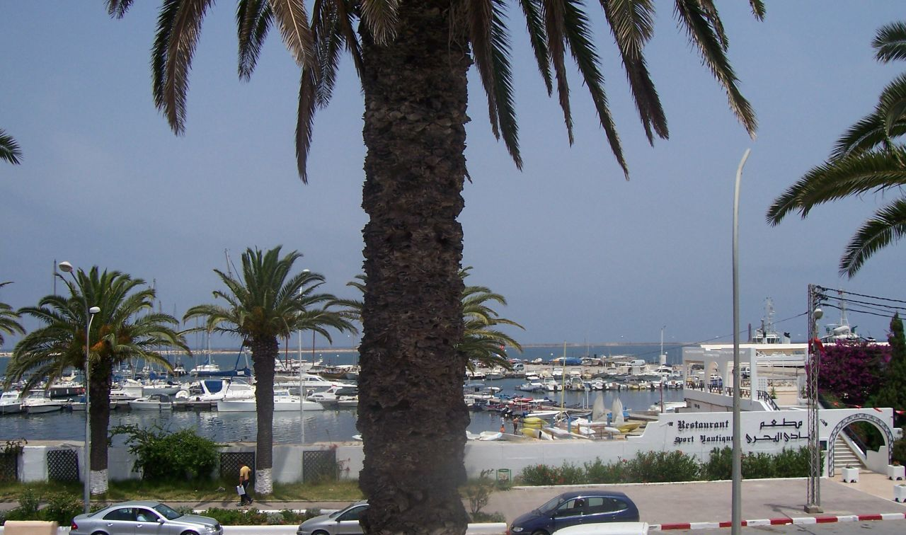 sport nautique à Bizerte